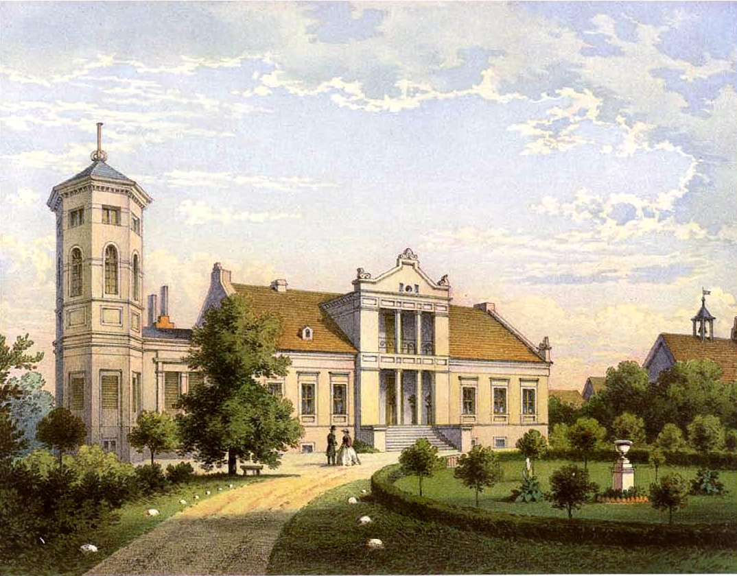 Rittergut Sienno, Kreis Bromberg, Provinz Posen, Lithografie aus dem 19. Jahrhundert